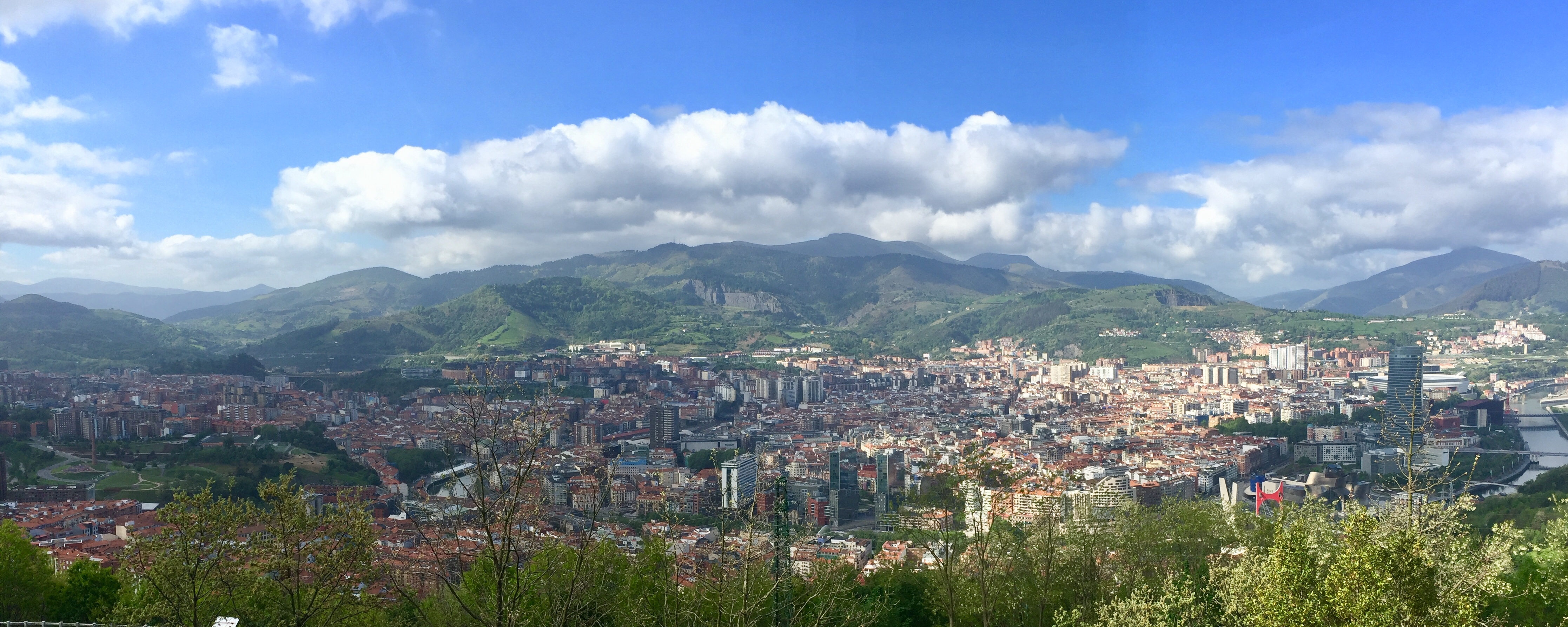 Bilbao cityview from Monte Artxanda (España 2019)